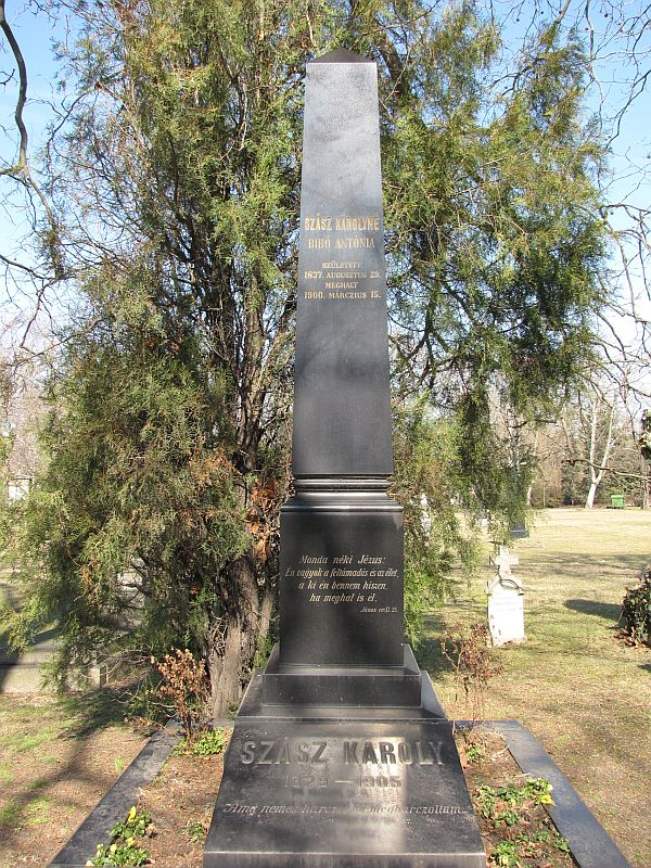 Szász Károly (Nagyenyed, 1829. jún. 15. – Bp., 1905. okt. 15.) költő, író, műfordító sírja Budapesten. Kerepesi temető: 28-díszsor-13.